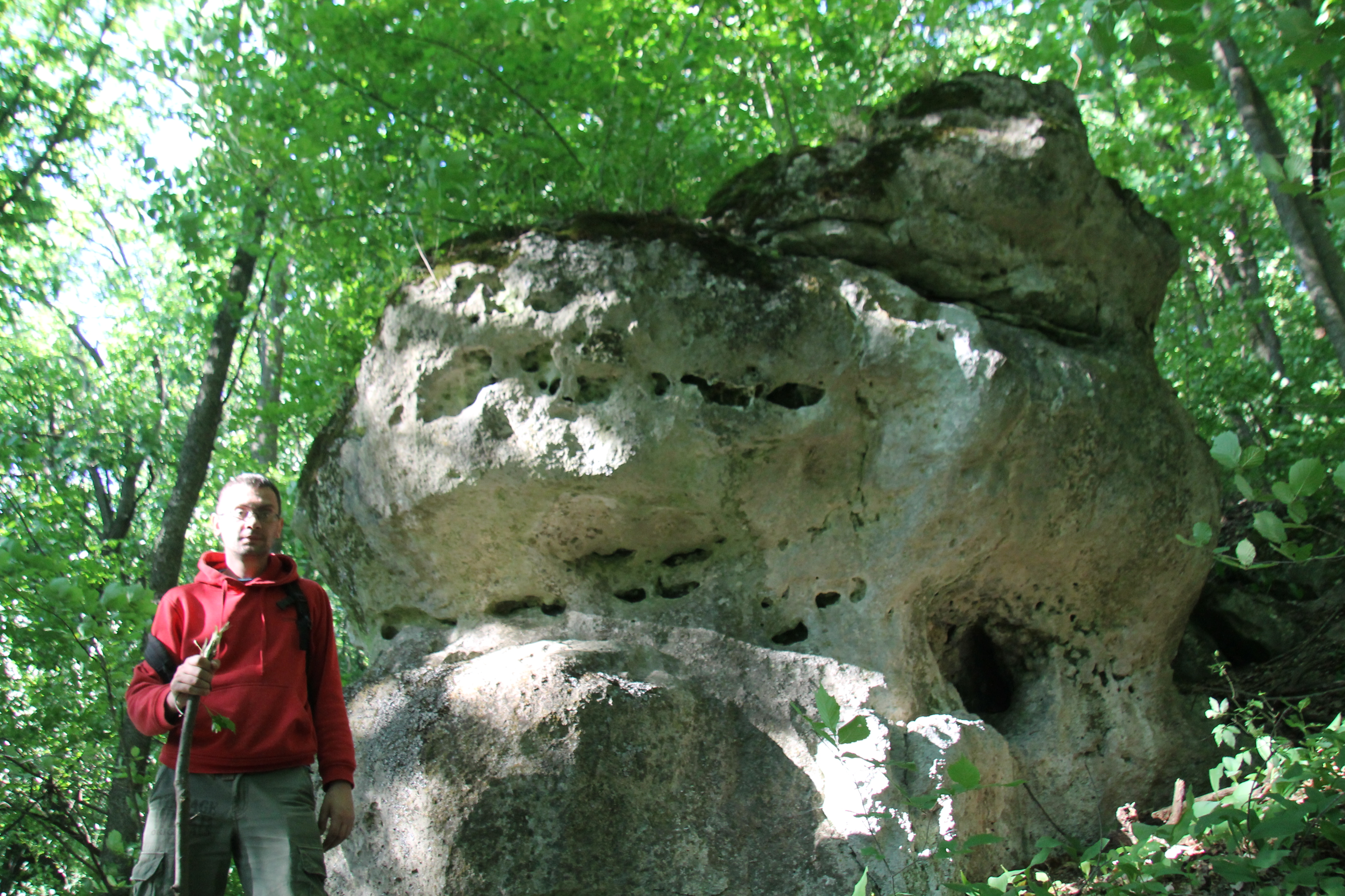 Княжпільський, Кам'янець-Подільський район, с.Княжпіль